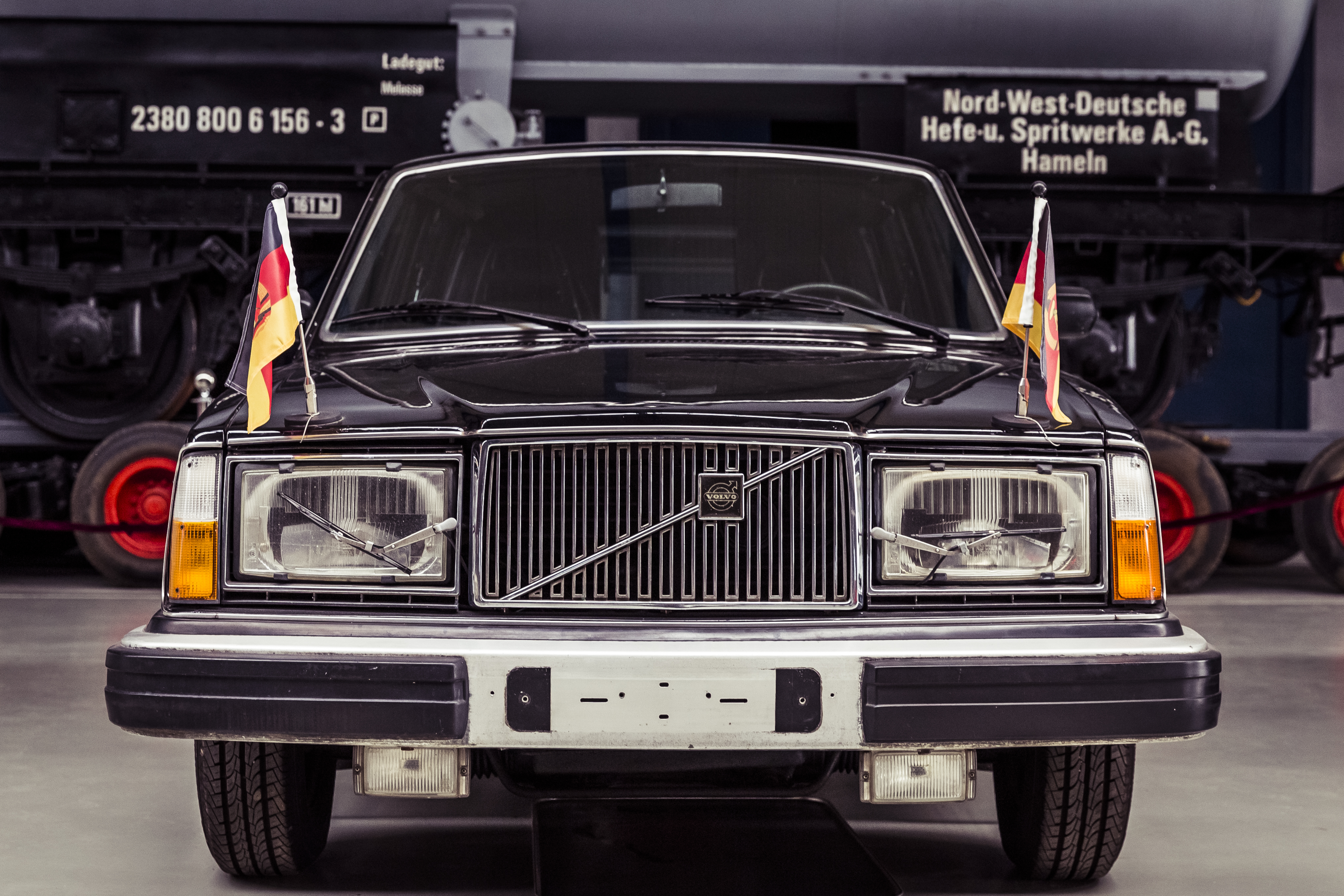 DDR Staatskarosse